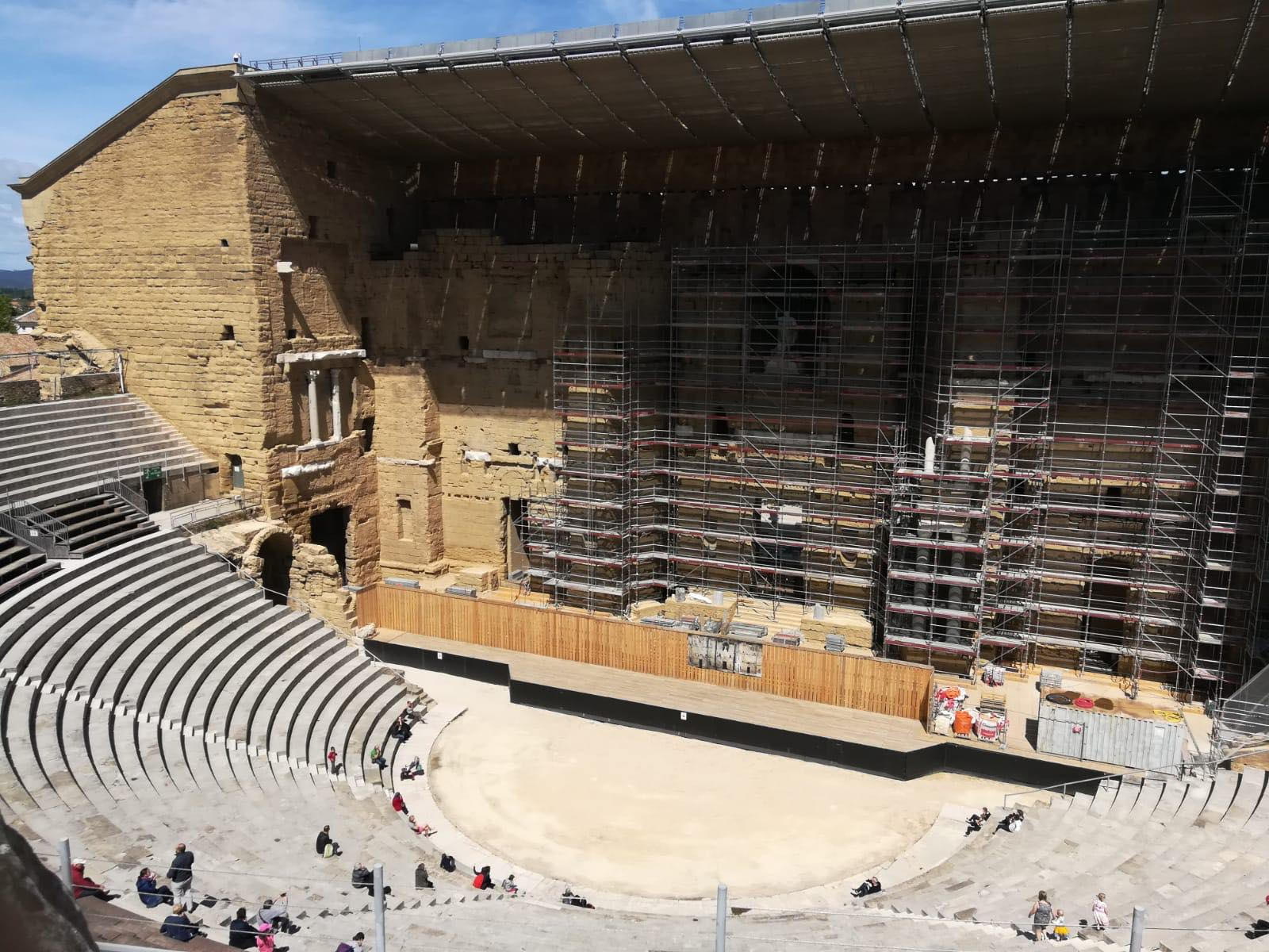 Le Théâtre antique d'Orange et ses travaux de restauration, à date de Avril 2019